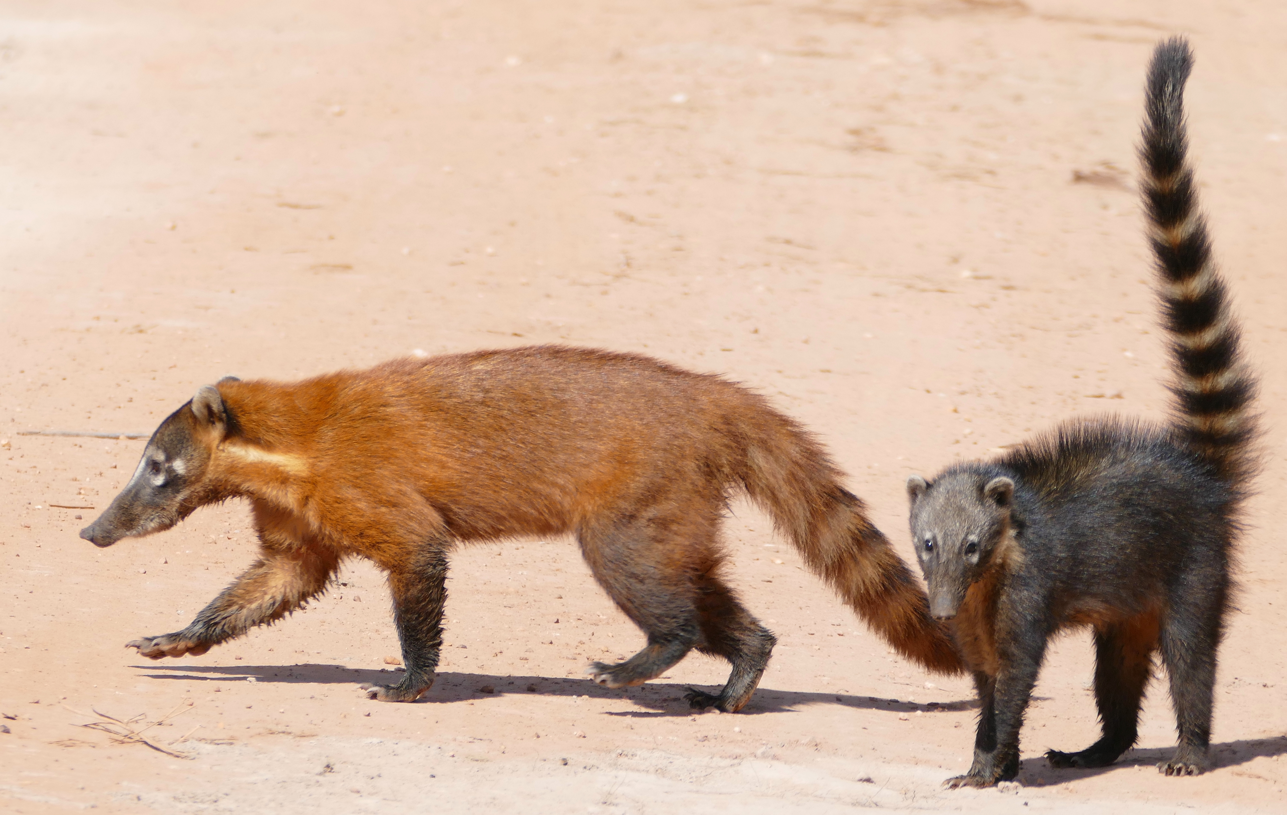 Pouso Alegre, Transpantaneira, Poconé, Mato Grosso, BRAZIL